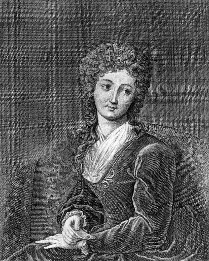 Александра Петровна Хвостова, урождённая Хераскова (1768—1853)